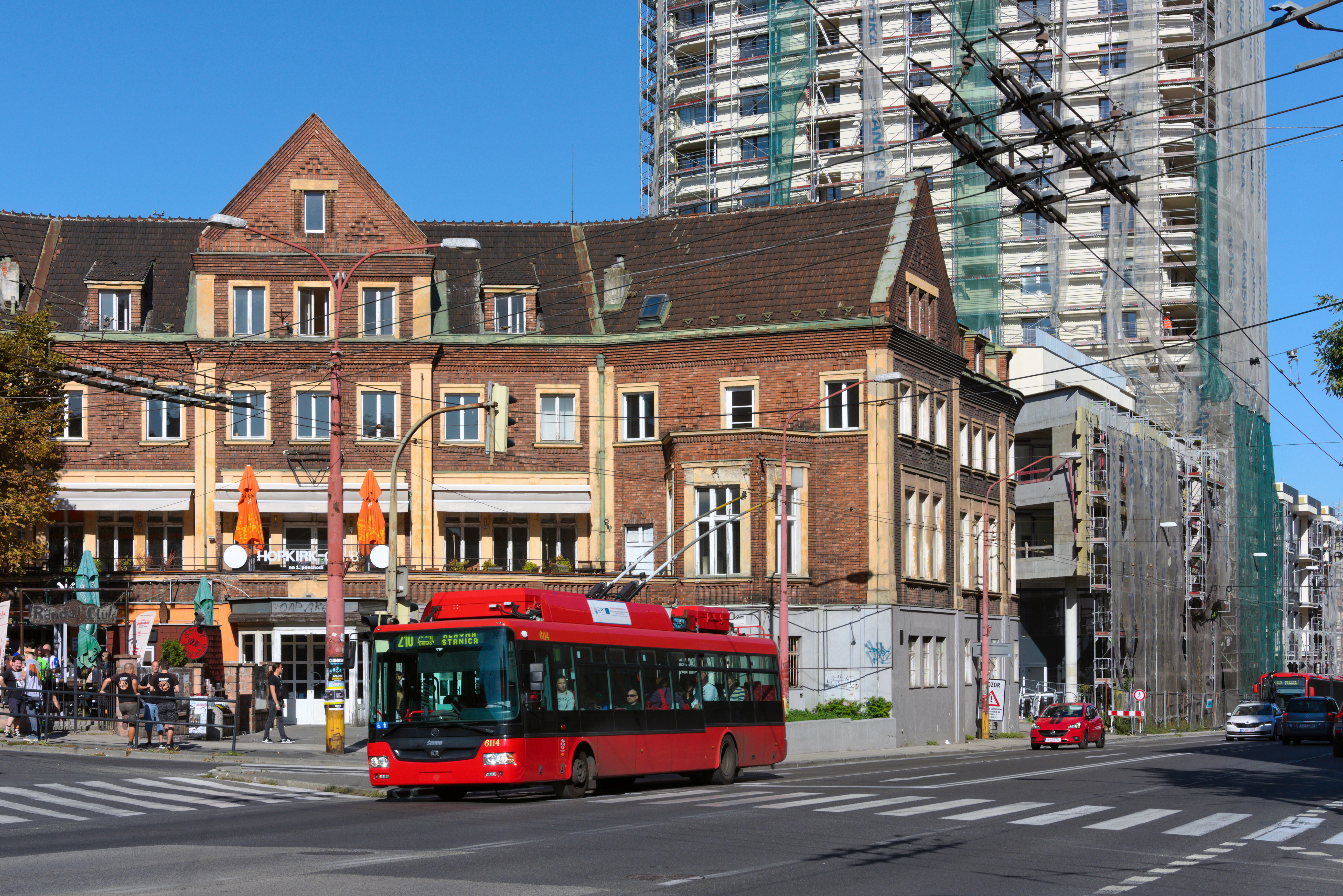 Škoda 30 TrDG SOR Nr. 6114 als Linie 210 bei der Haltestelle Karpatská